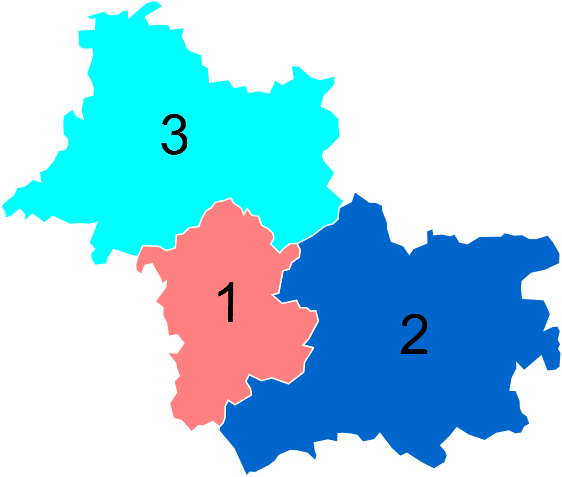 Résultats des élections législatives du Loir-et-Cher en 2012